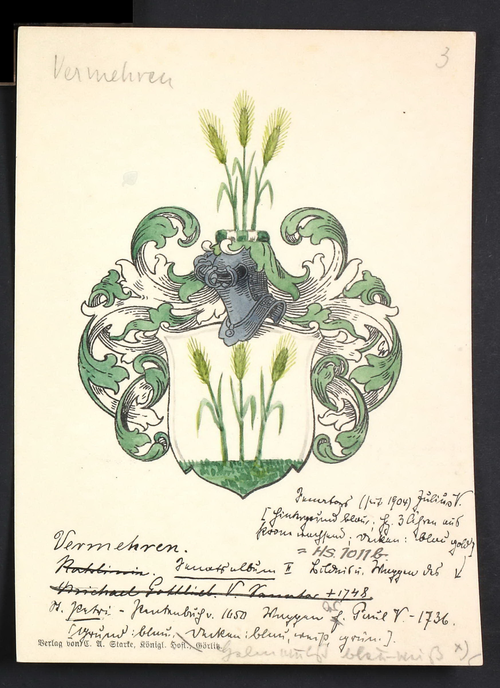 Wappen Vermehren mit Kornähren, aus: Archiv der Hansestadt Lübeck, comp. Wappenkarten ca. 1300-1850. Lübeck: Archiv der Hansestadt Lübeck. HS 1051.